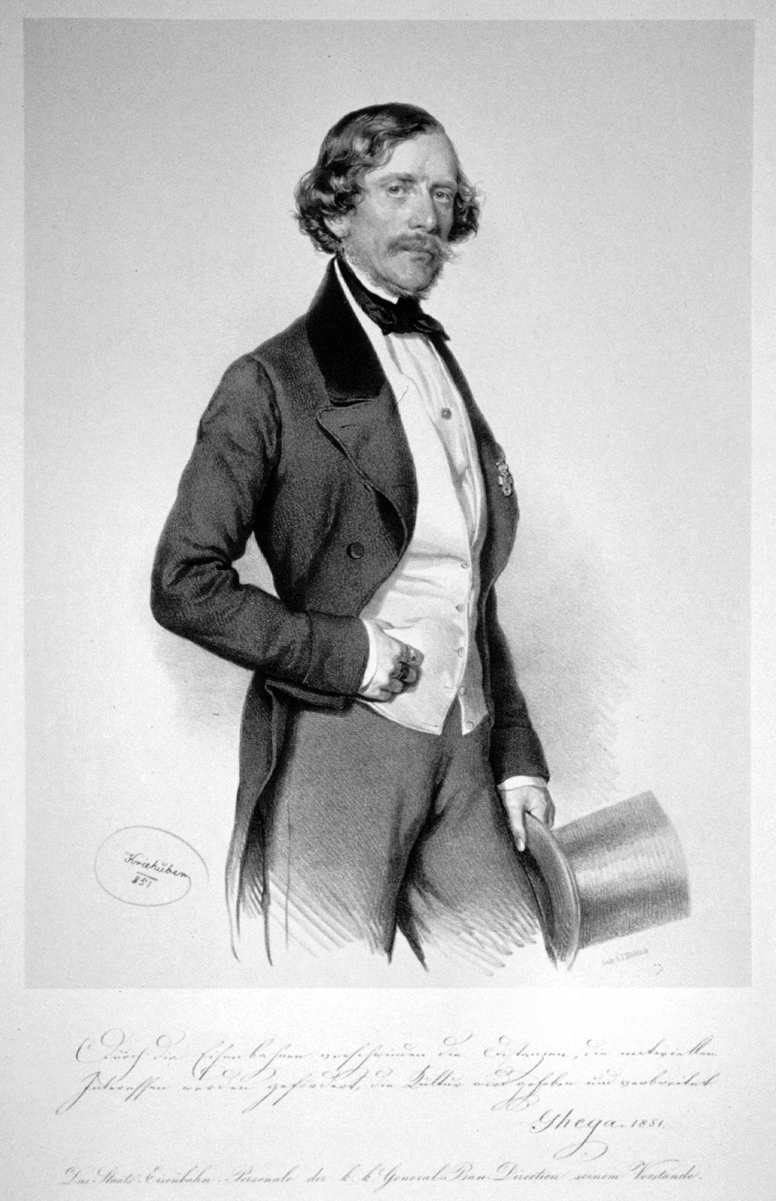 Carl Ritter von Ghega; Lithographie von Joseph Kriehuber, 1851